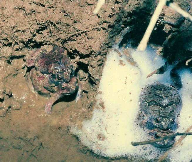 Eupemphix nattereri